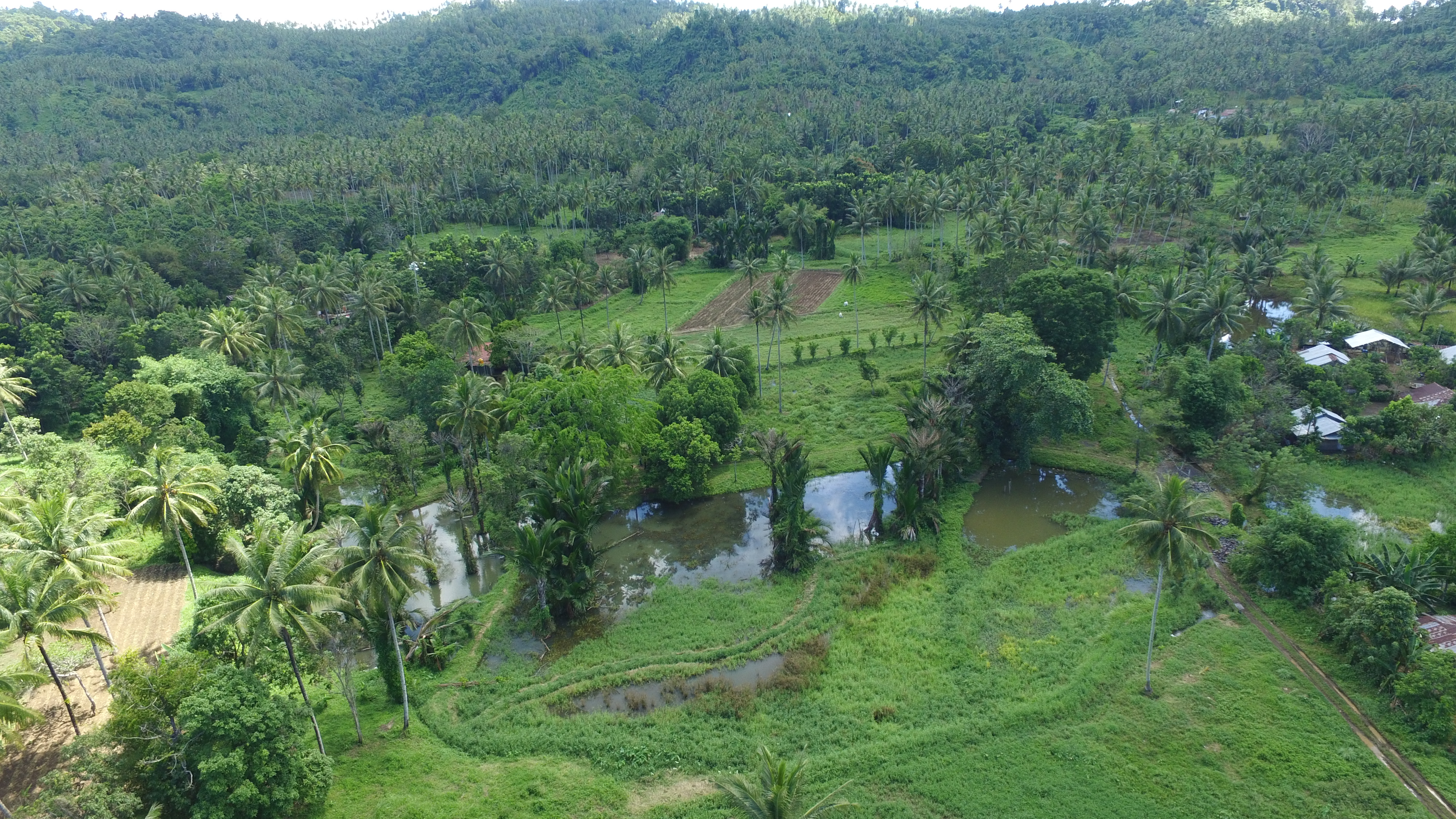 Wasian, Dimembe, North Minahasa Regency, North Sulawesi, Indonesia